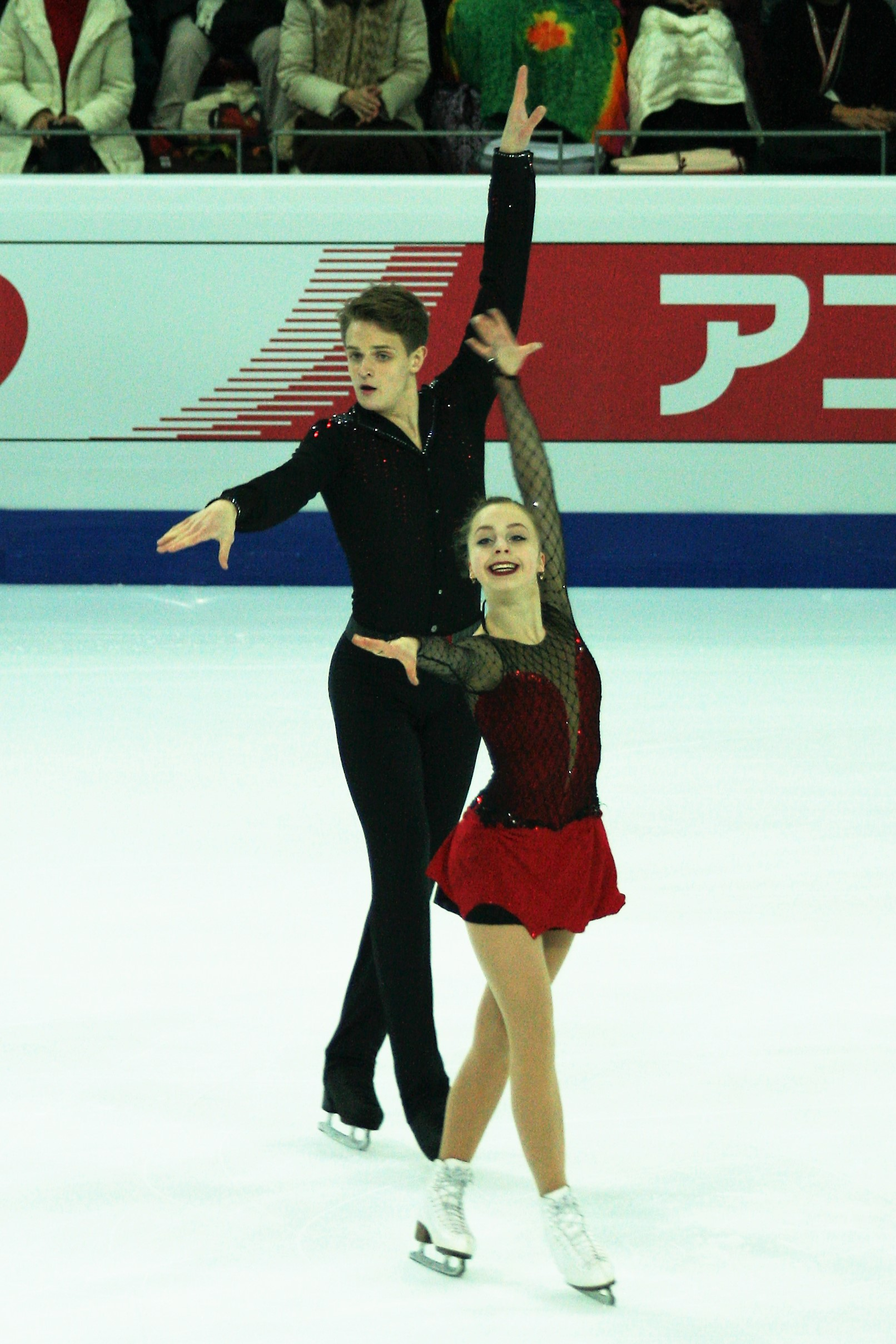 Александра Бойкова / Дмитрий Козловский (Россия) на финале Гран-при по фигурному катанию среди юниоров 2016-2017